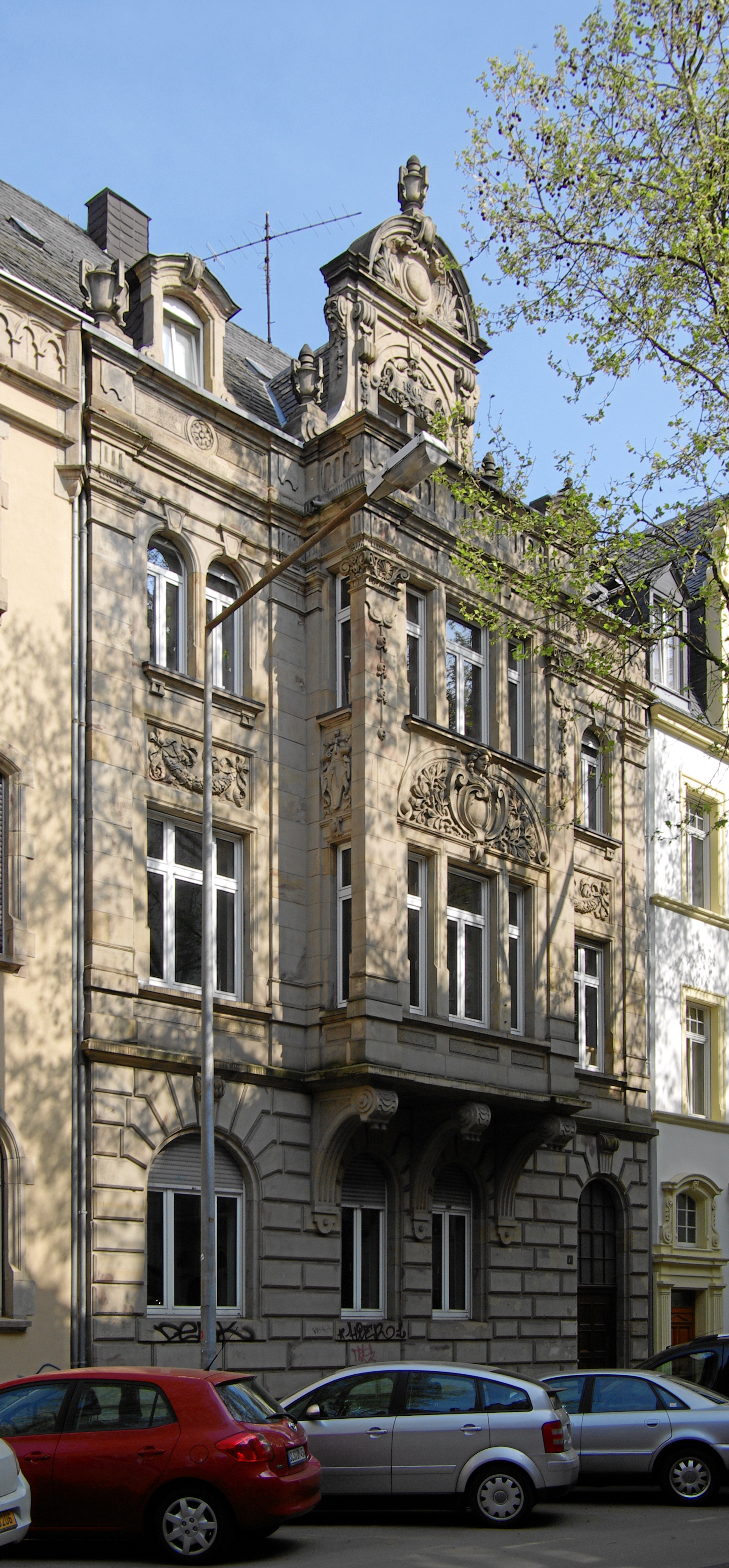 Trier, Bruchhausenstr. 16a, dreigeschossiges Zeilendoppelwohnhaus, 1904/05, Architekt August Wolf; Nr. 16 sandsteingegliederter Putzbau, neugotische und Neurenaissance-Motive, Nr. 16a repräsentativer Sandstein(quader)bau; Ausstattung